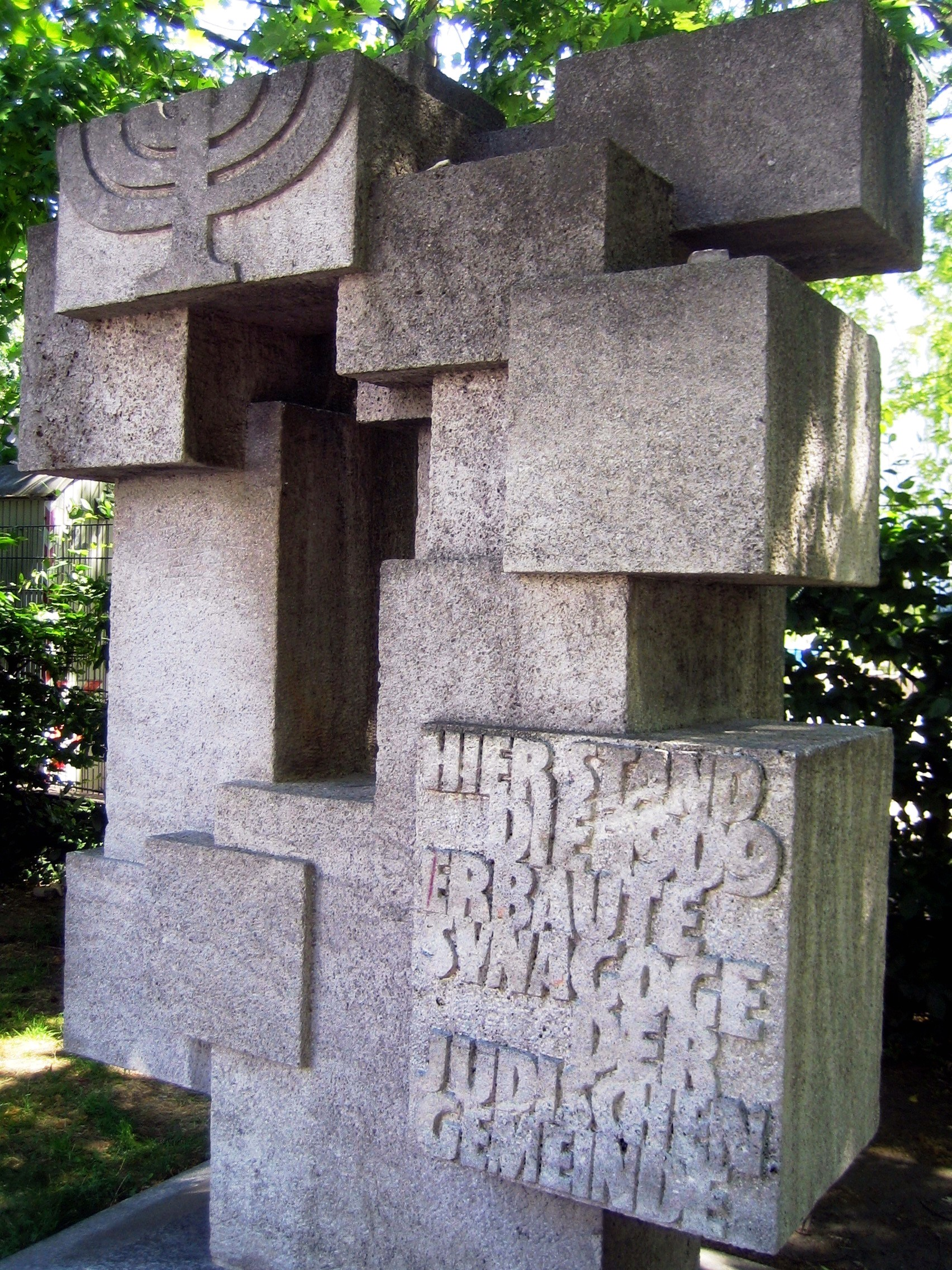 Berlin-Schöneberg, Bayerisches Viertel, Münchener Straße. Denkmal für eine Synagoge, die im Zweiten Weltkrieg schwer beschädigt und 1956 abgerissen wurde.